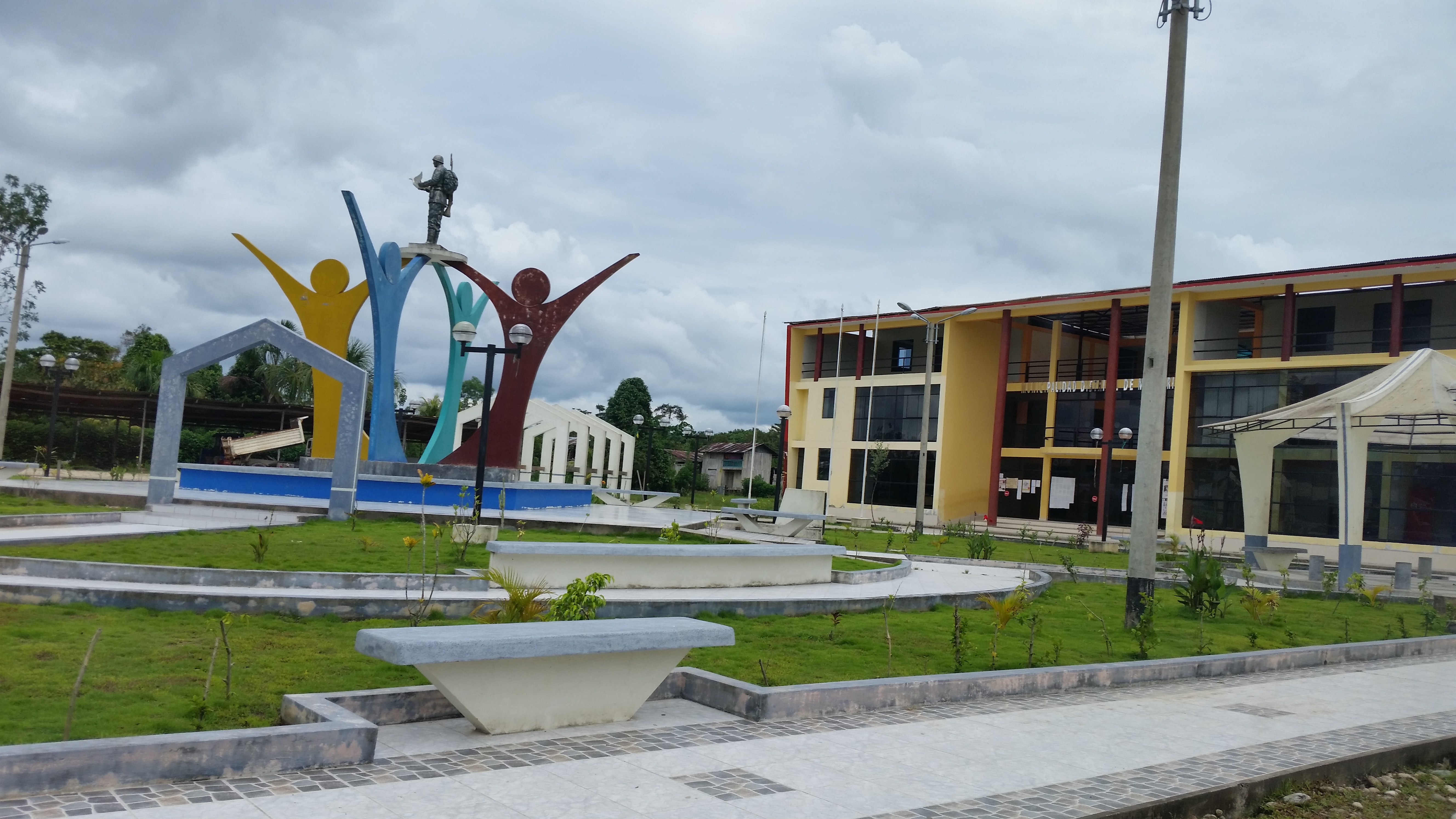 Sarameriza